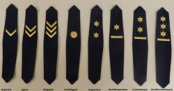 Overzicht%20rangen%20KPCN.jpg